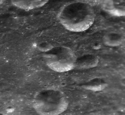 乔娜陨石坑的照片